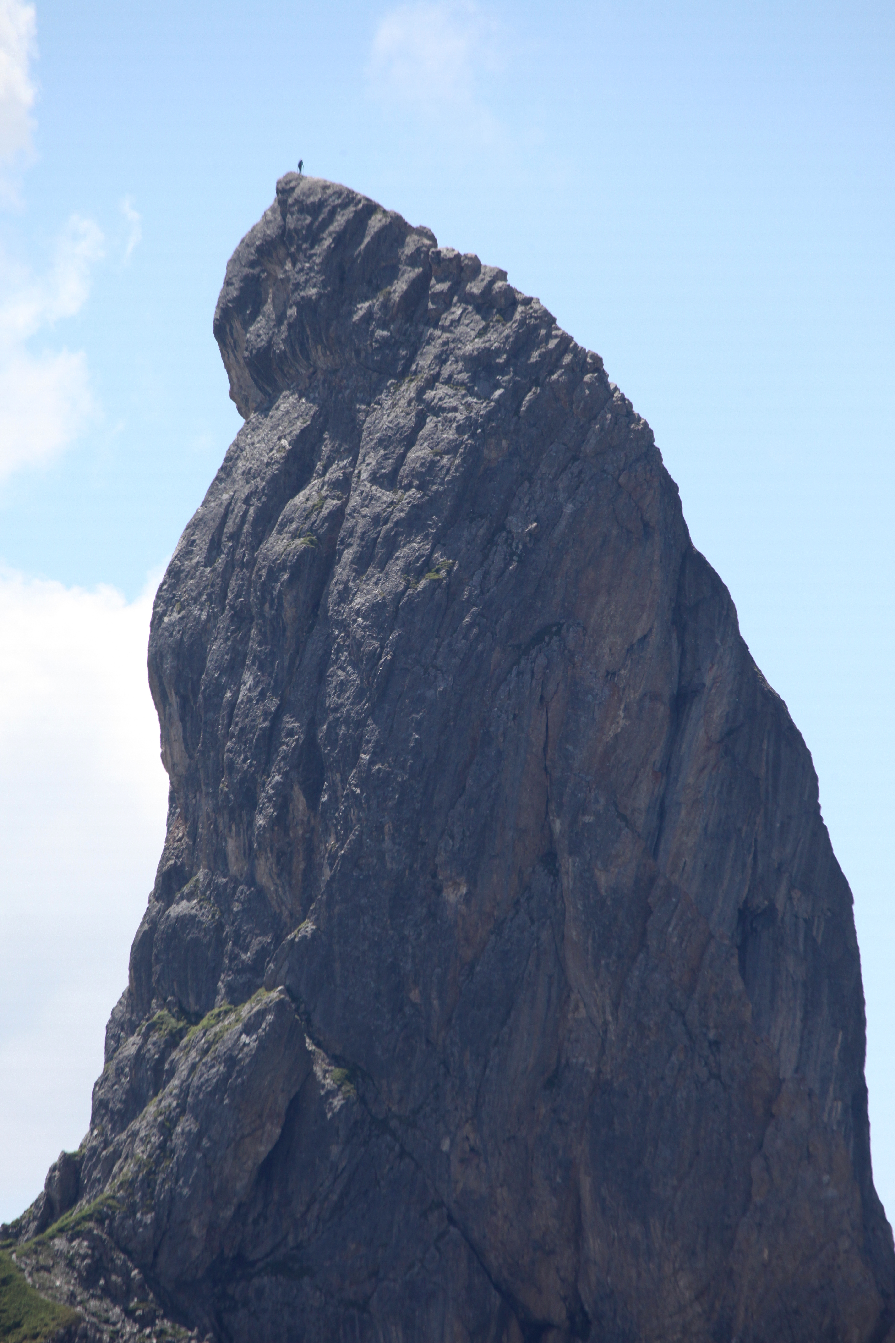 Alpiniste au sommet de la Pierra Menta.